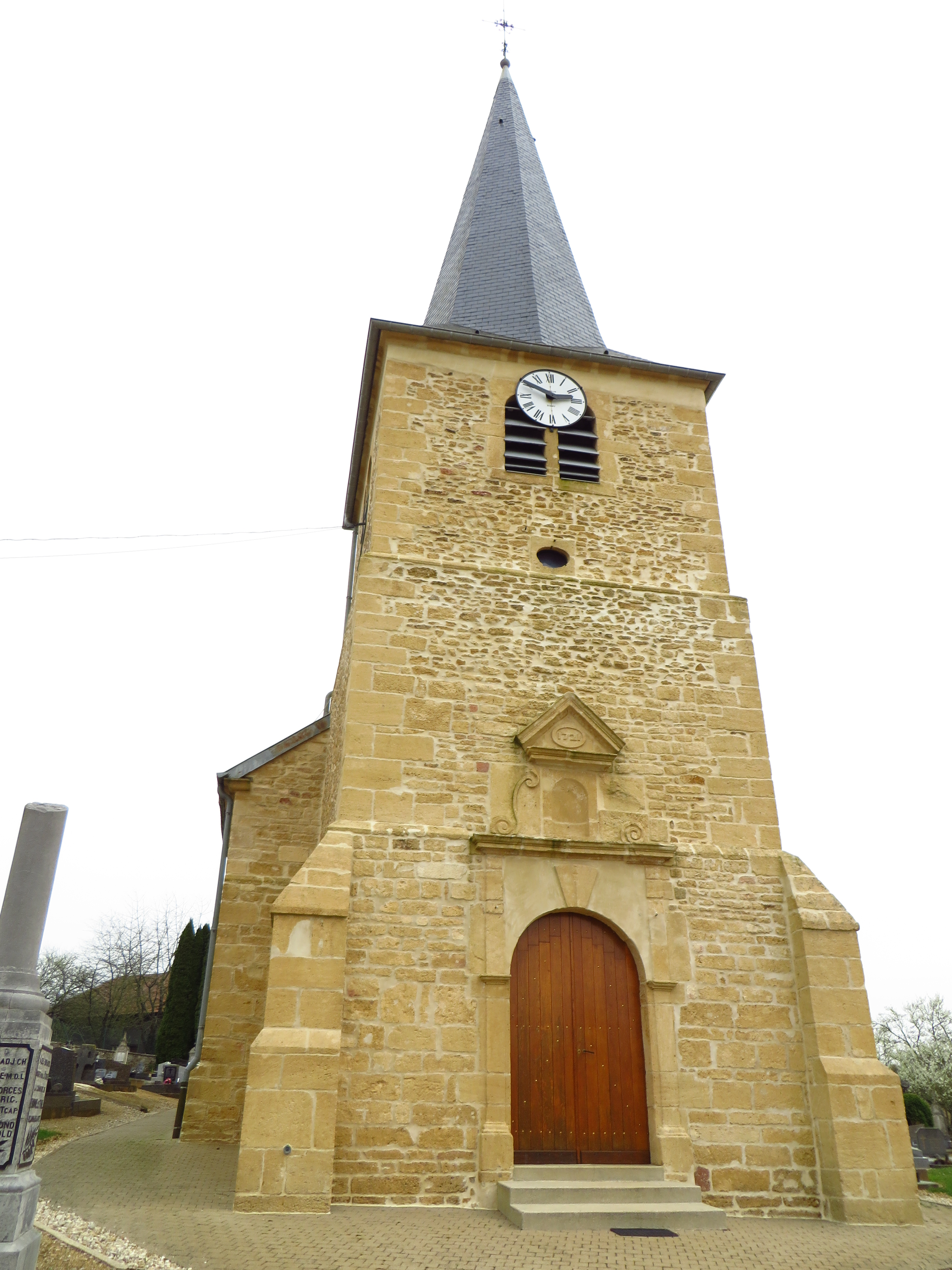 Thonne-le-Thil L'église Saint-Martin